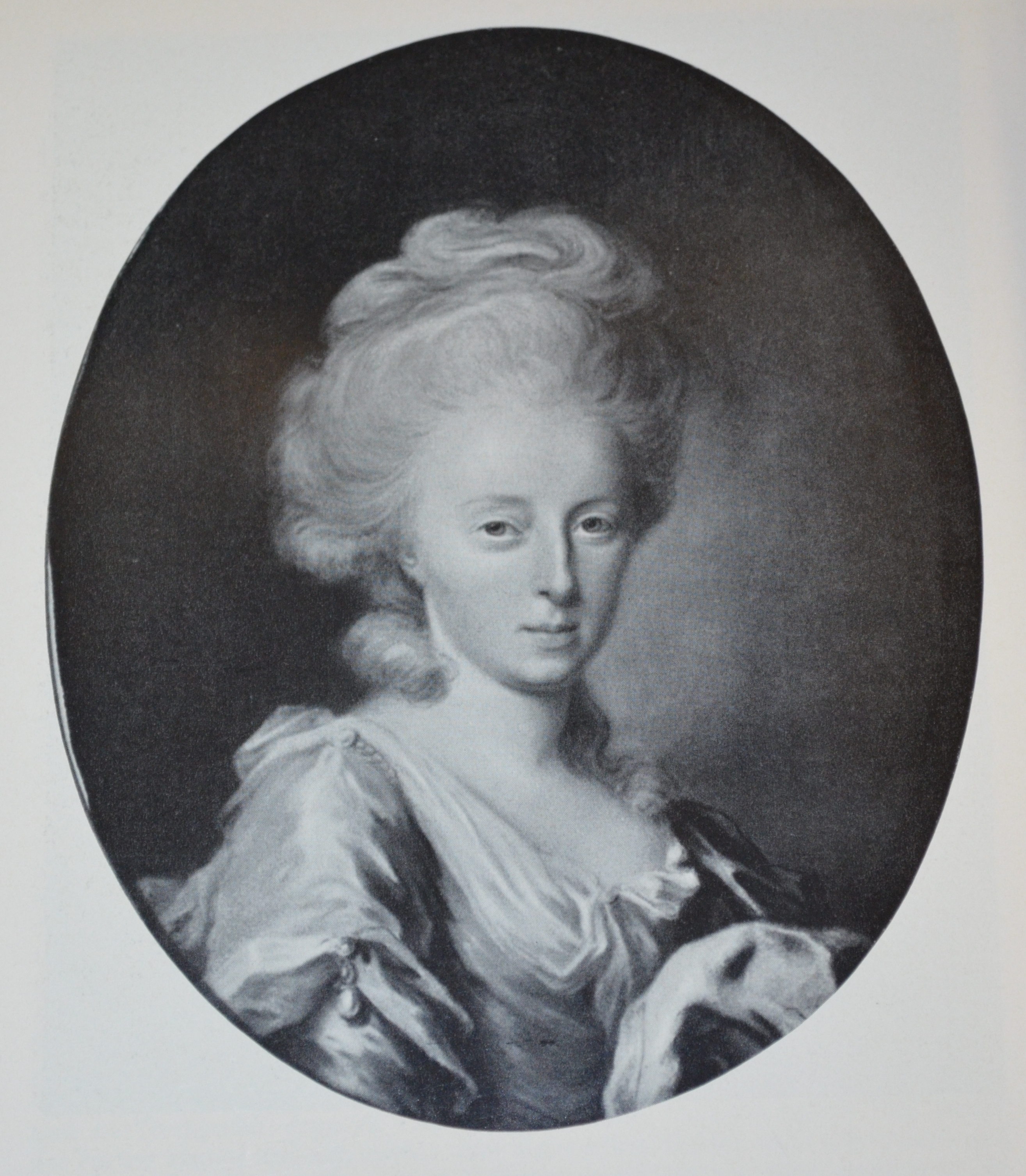 Reichsgräfin Louise Charlotte von Hompesch-Heyden (* 1755), Ehefrau von Johann Conrad Riedesel zu Eisenbach (* 1742; † 1812)